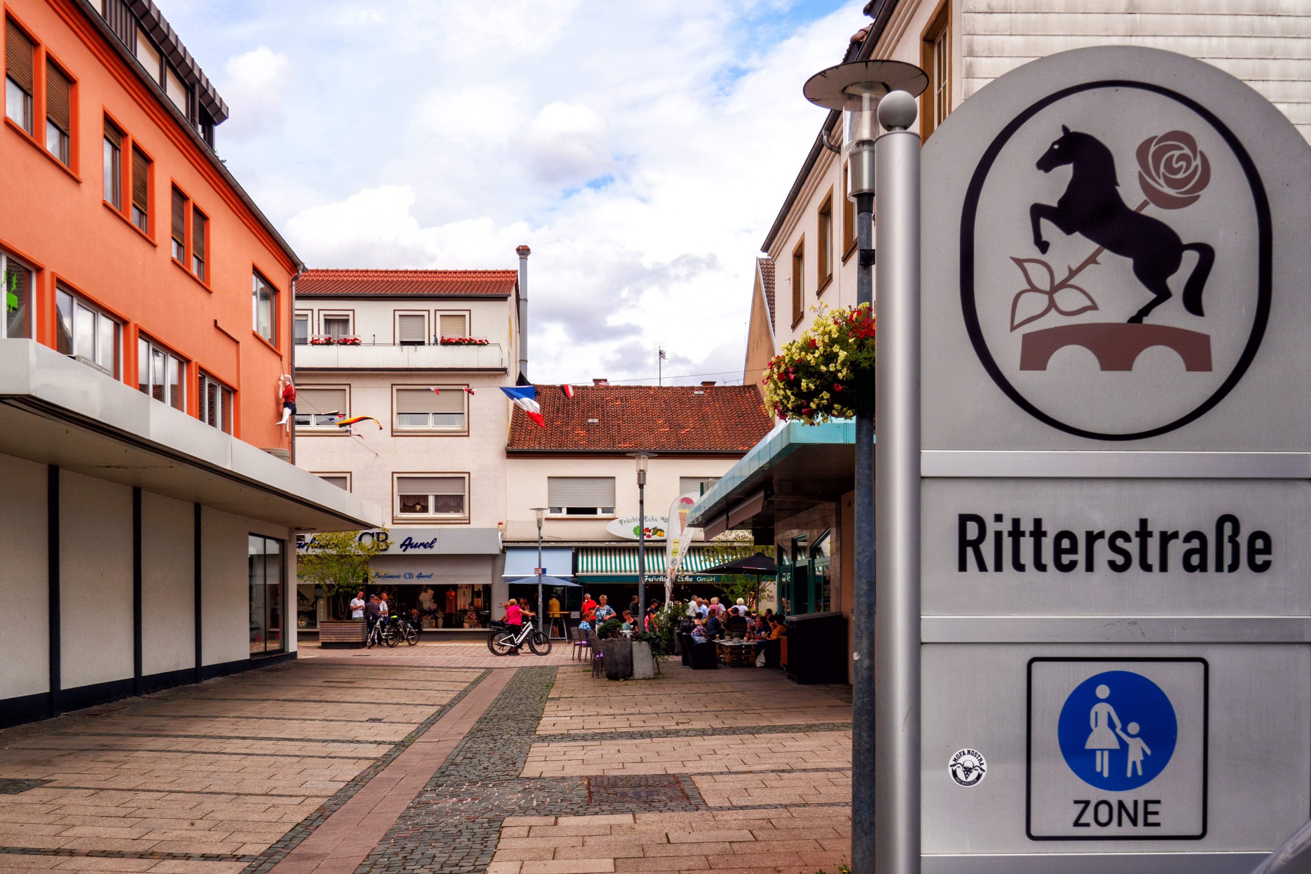 Nördlicher Teil der Ritterstraße in Zweibrücken, Beginn der Fußgängerzone. Die Straße wurde benannt nach dem Zweibrücker Verleger und Buchdrucker Georg Ritter (1795-1854)